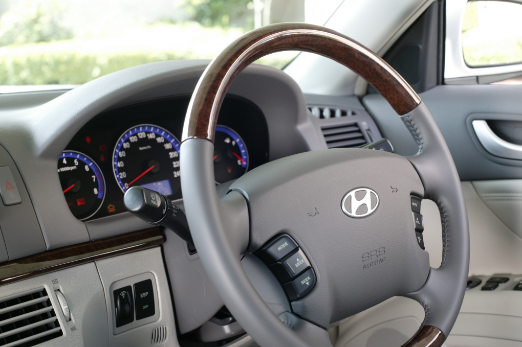 Hyundai Sonata interior.